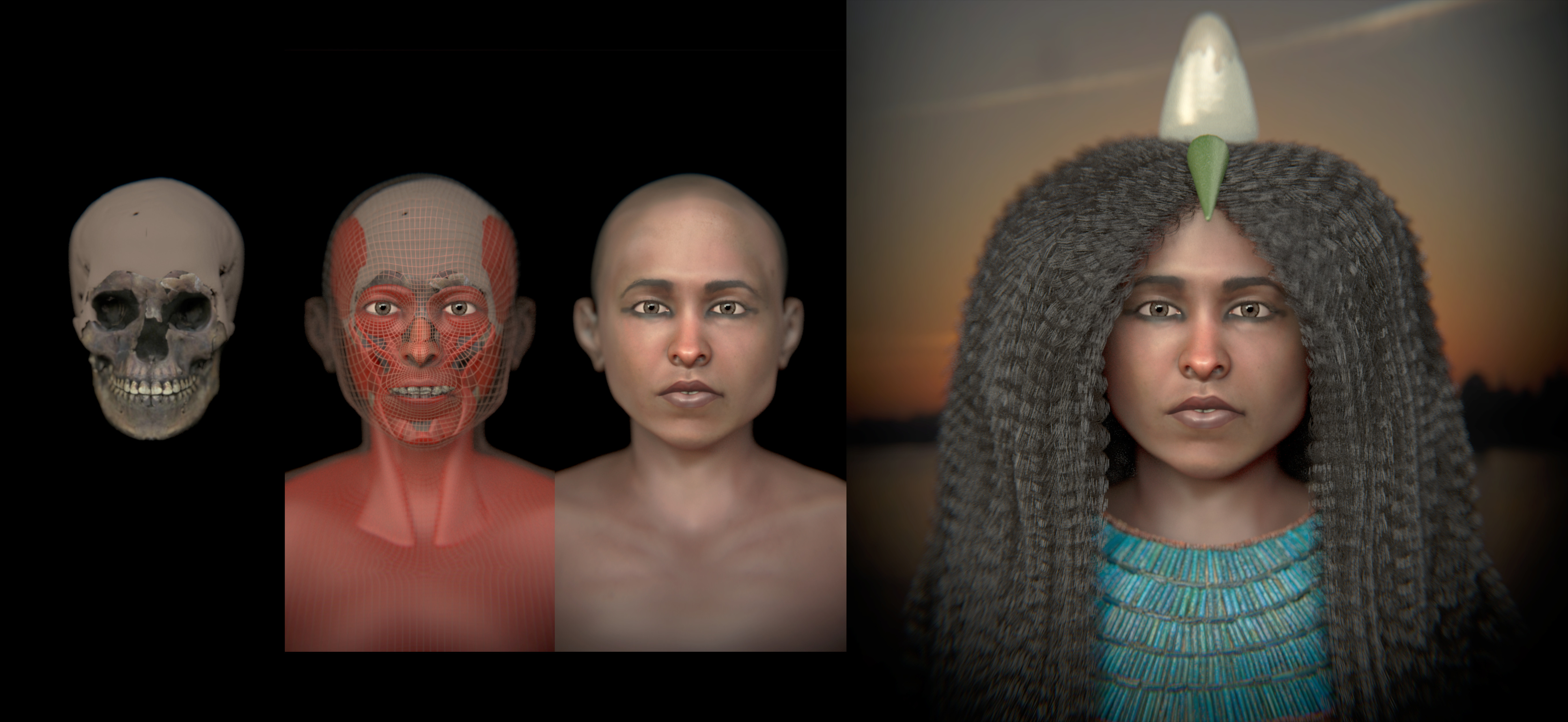 Reconstrução facial forense efetuada para o projeto Tothmea+6, uma parceria do Museu Egípcio Rosacruz, do arqueólogo Dr. Moacir Elias Santos e do 3D designer Cícero Moraes.